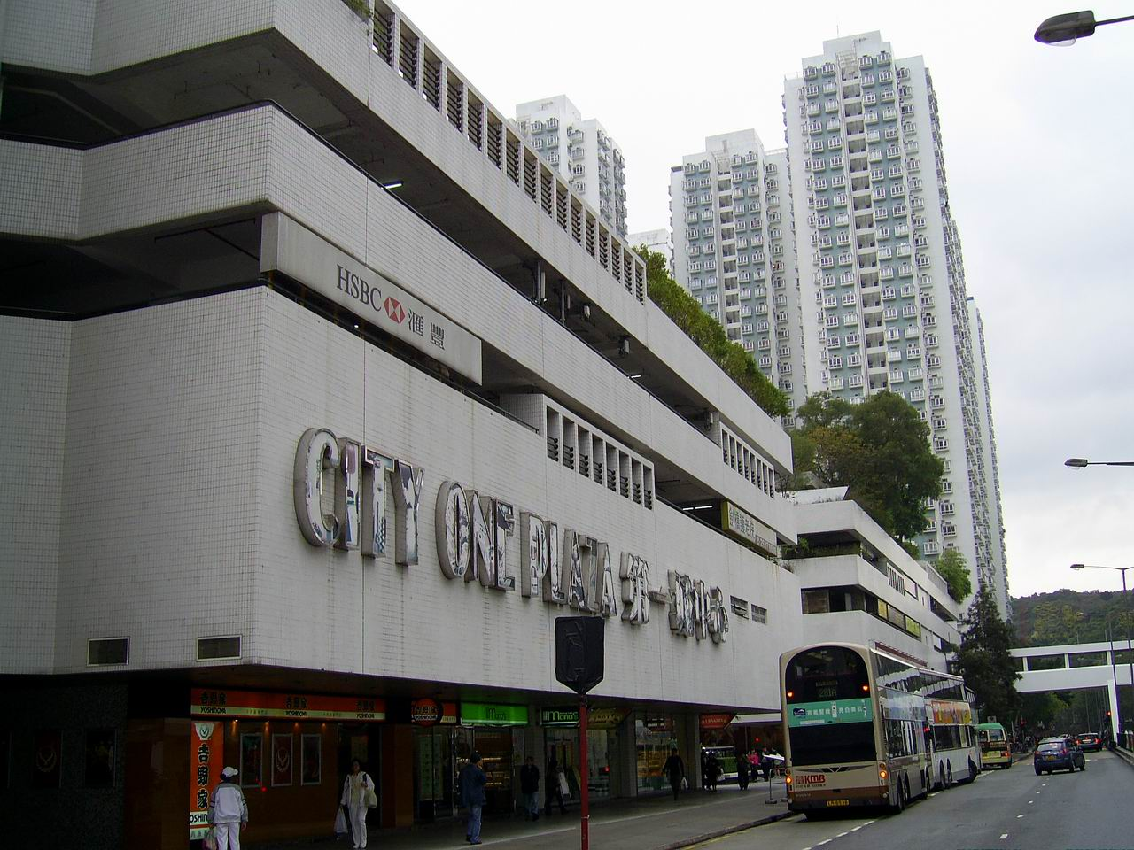 沙田第一城第一城中心